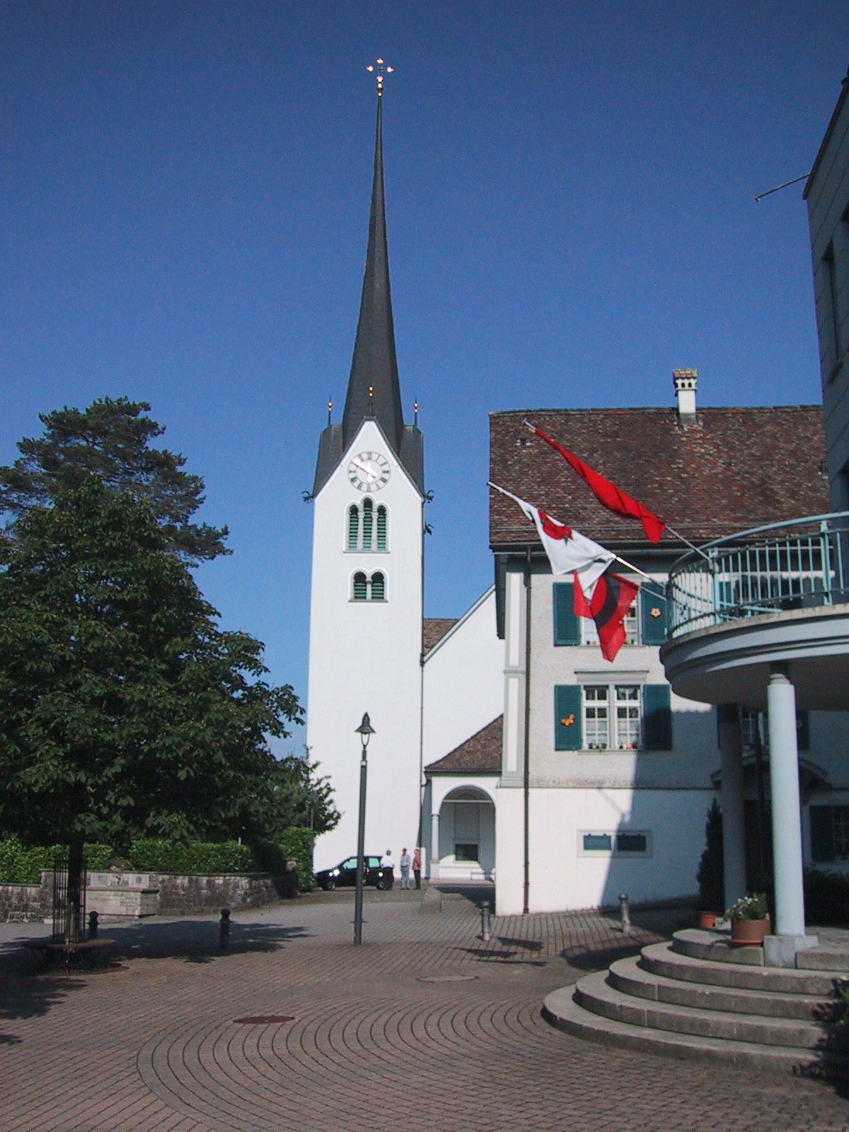 Altendorf SZ. Aufnahme 13. Juni 2005, Fotograf Peter Berger (selbst fotografiert). Lizenzstatus "GNU-FDL"